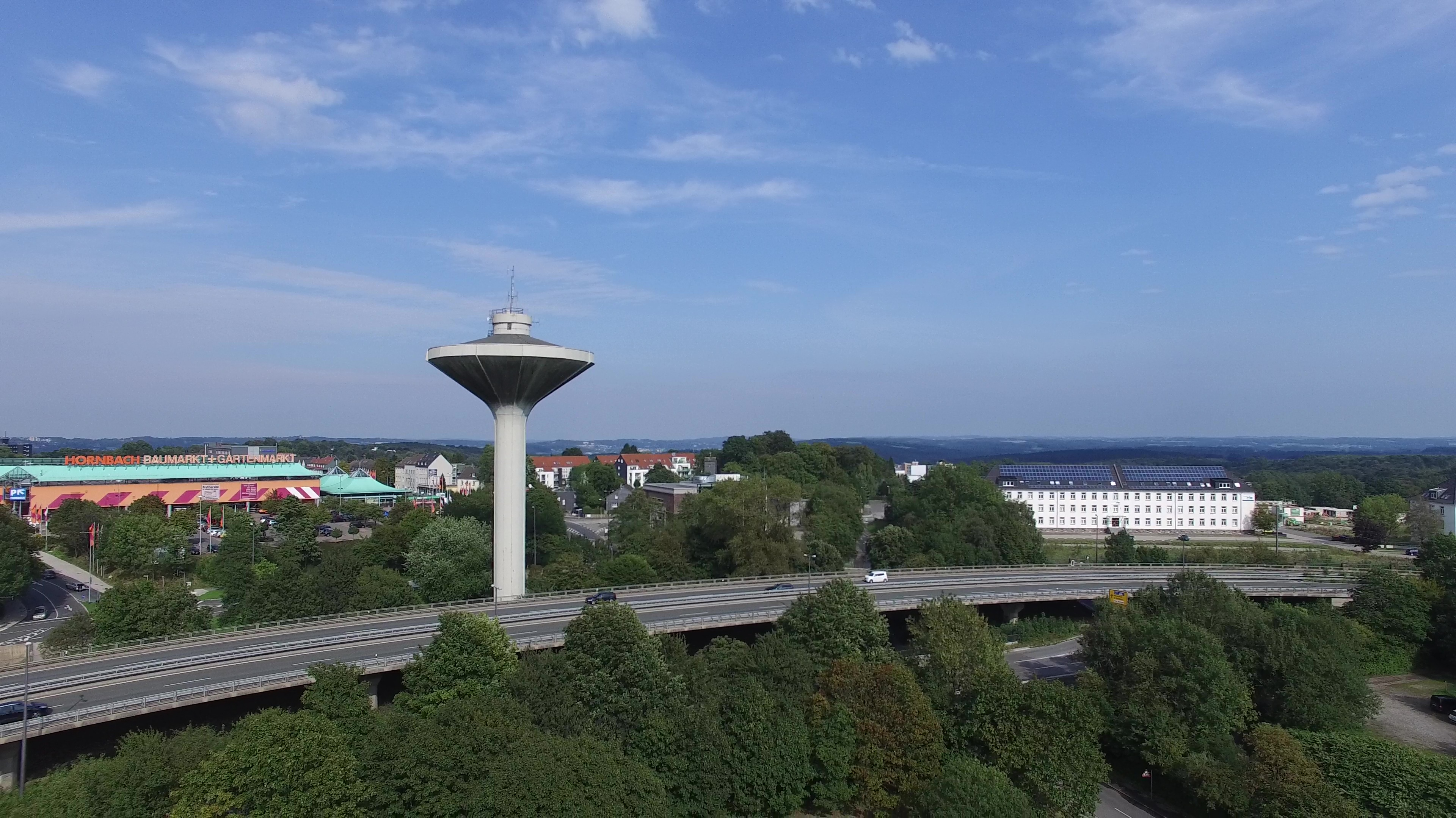 Lichtscheider Wasserturm und Überflieger der Landesstraße 418/419